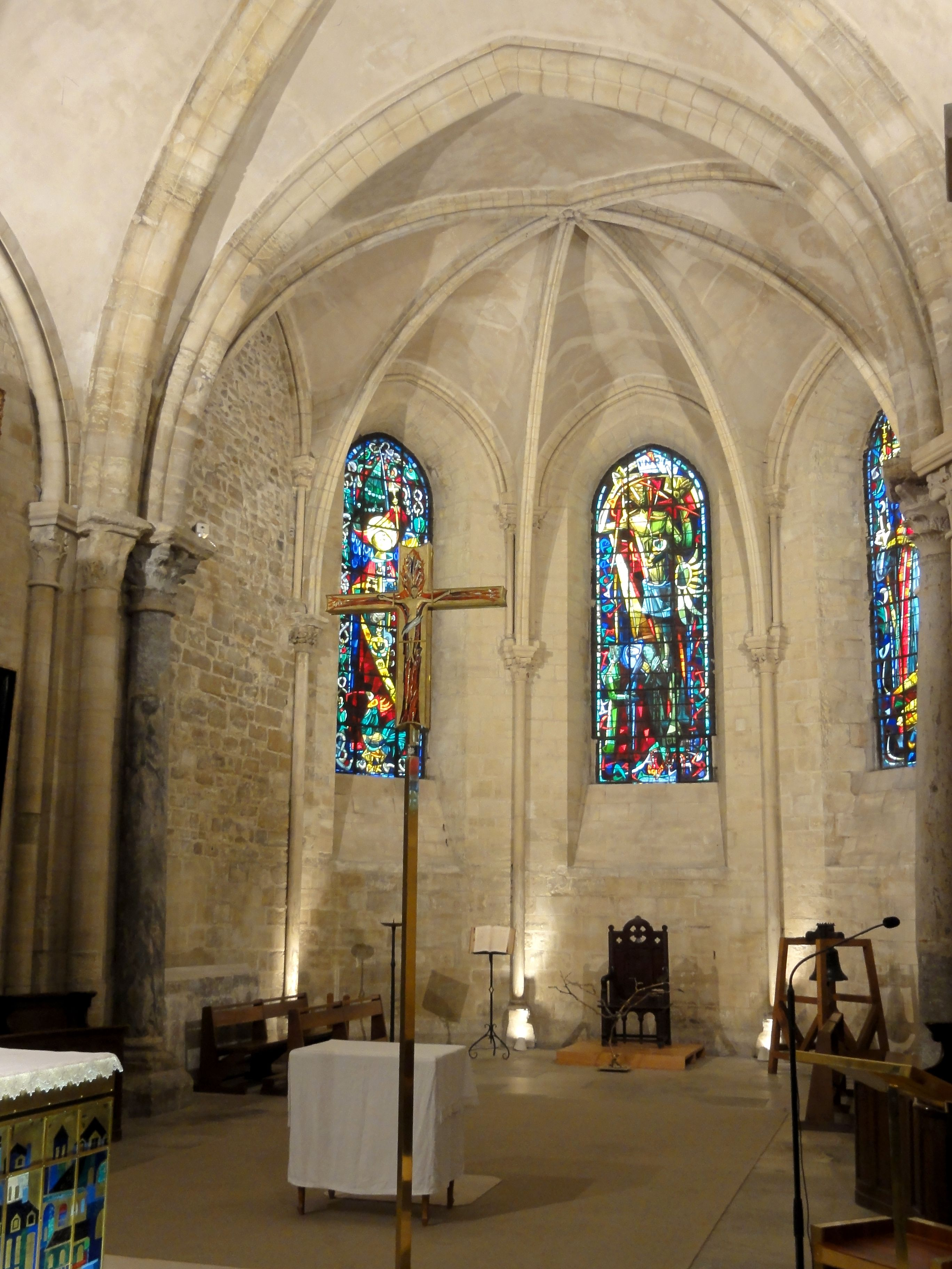 Chœur, vue dans l'abside.